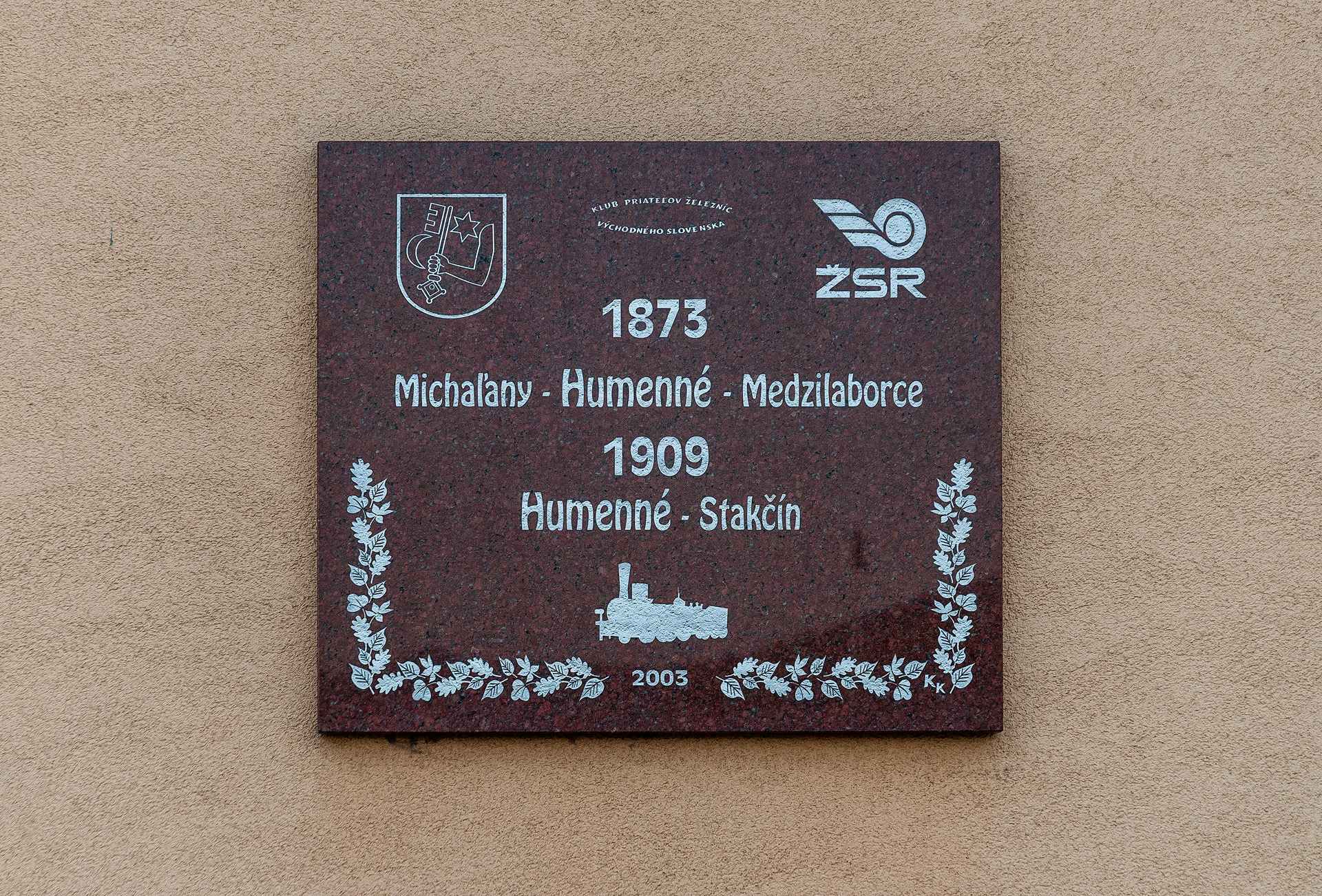 Pamětní deska k výročí otevření tratí Michaľany - Humenné - Medzilaborce a Humenné - Stakčín, visící na zdi staniční budovy v Humenném.